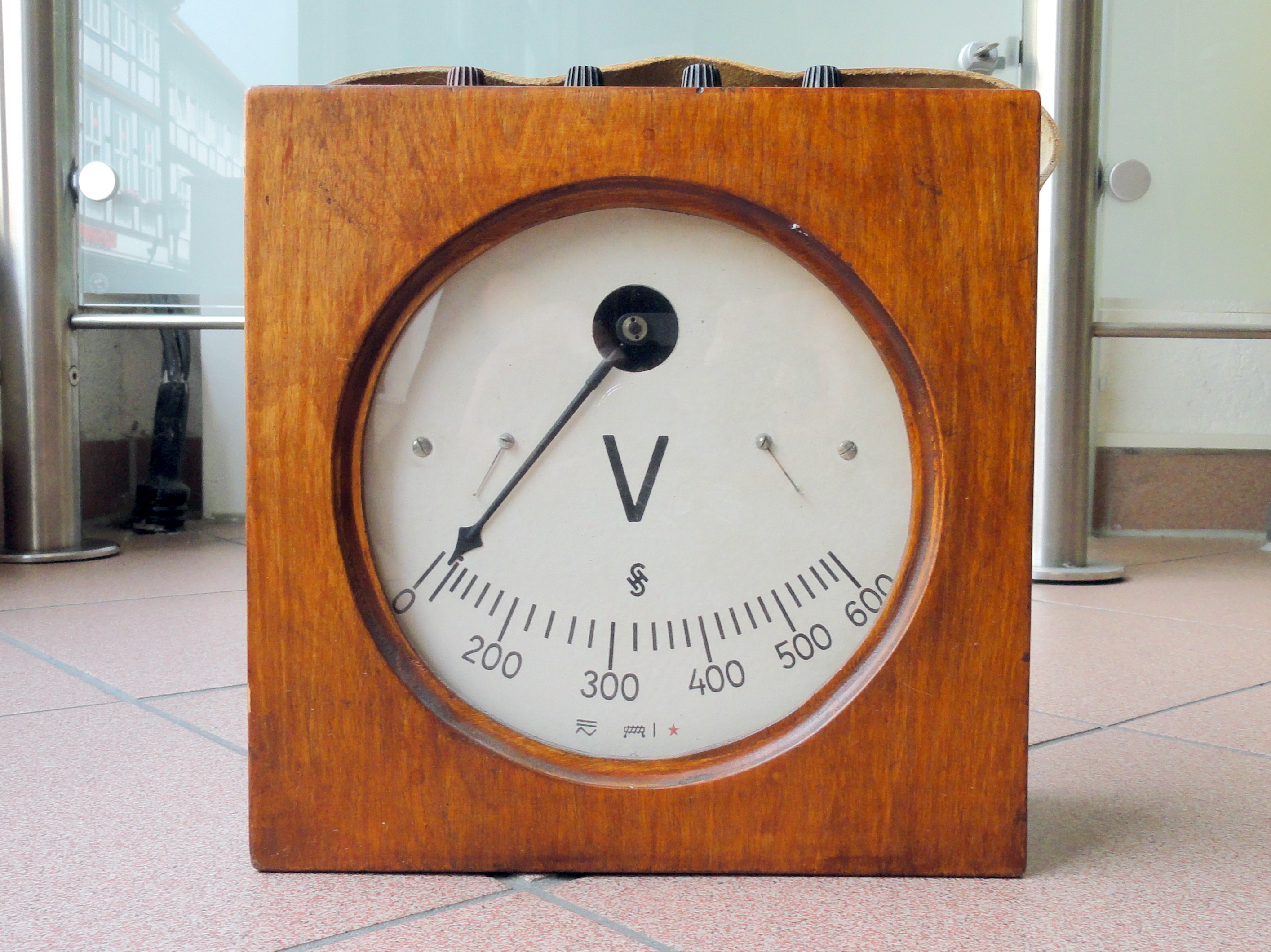 Old Volt Meter. Photographed at the Stadtwerke Wernigerode.